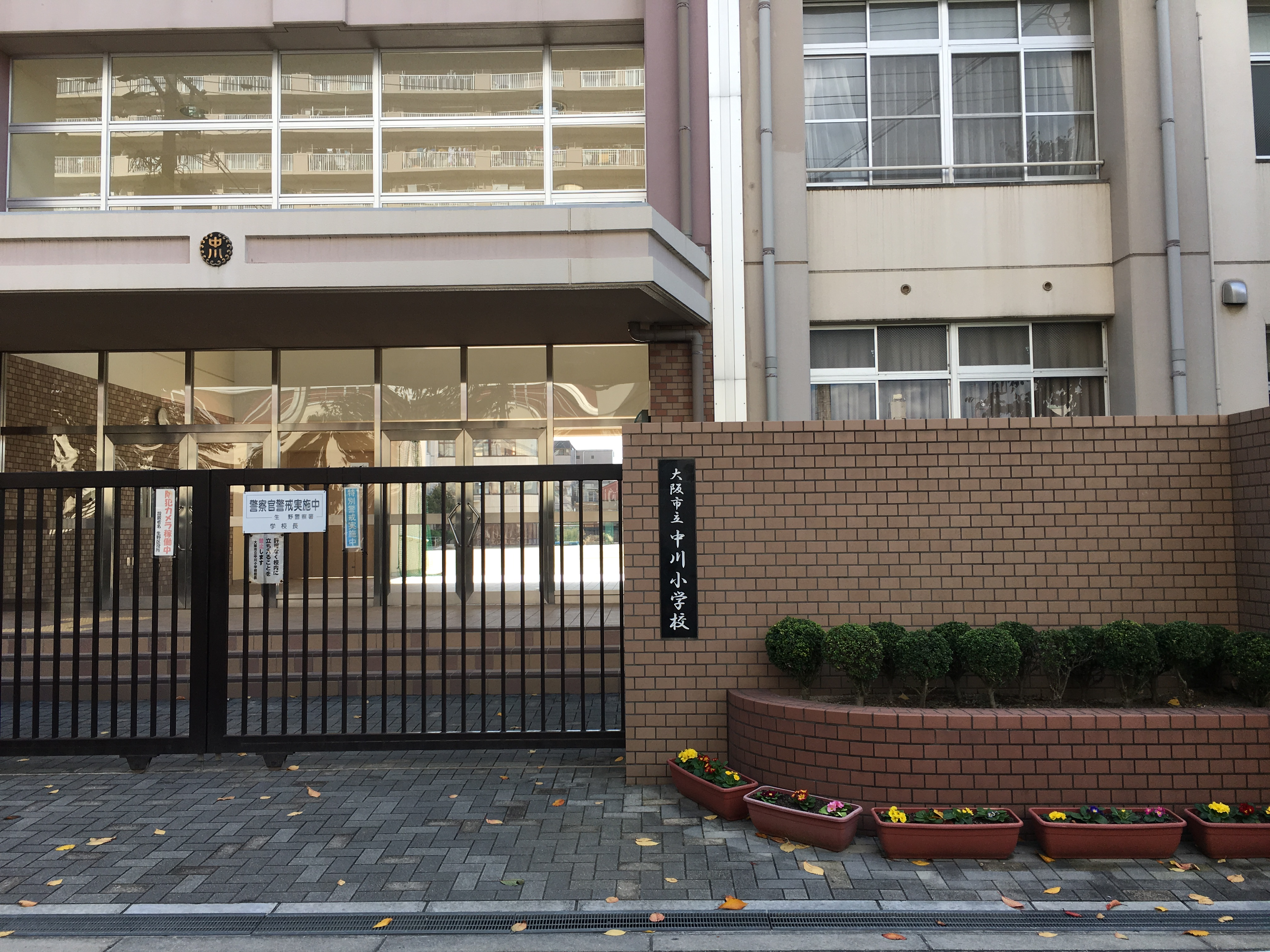 大阪市立中川小学校